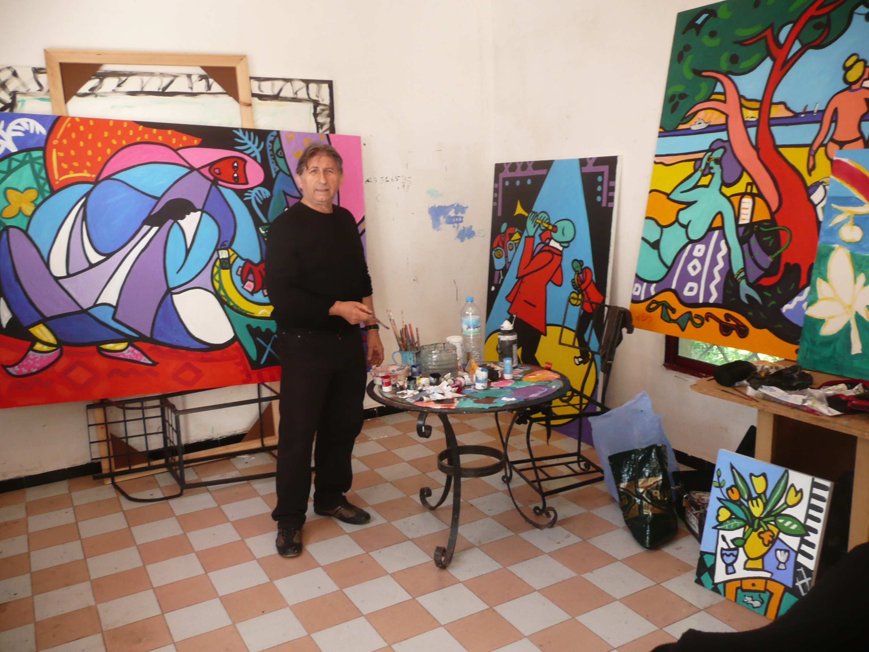 L'artiste dans son atelier.